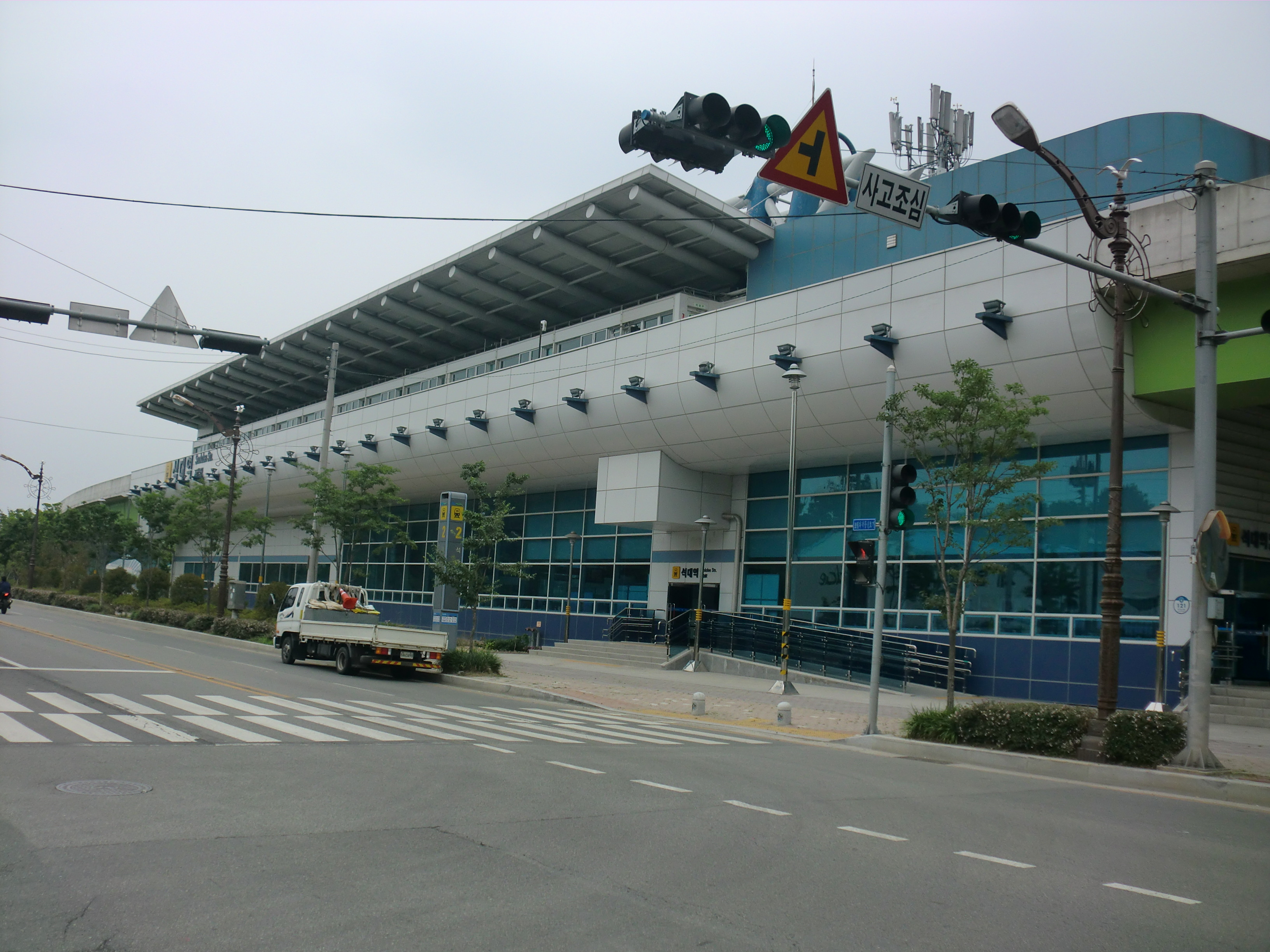 부산도시철도4호선 석대역